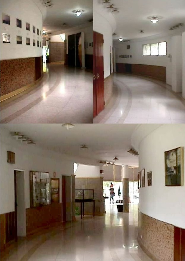 Planetario Humboldt Caracas - Venezuela 2011